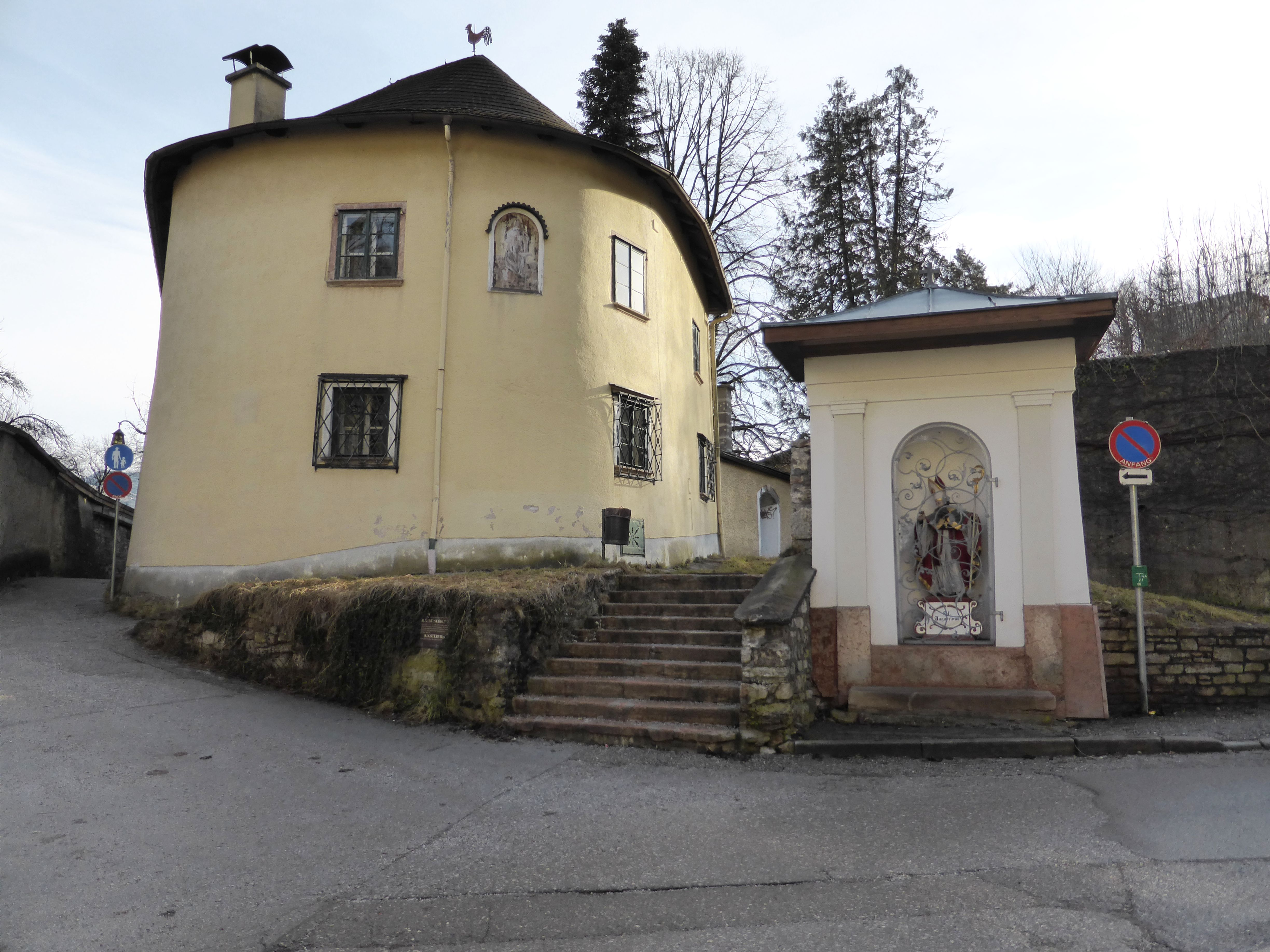 Benedikt-Stöckl und Kapelle